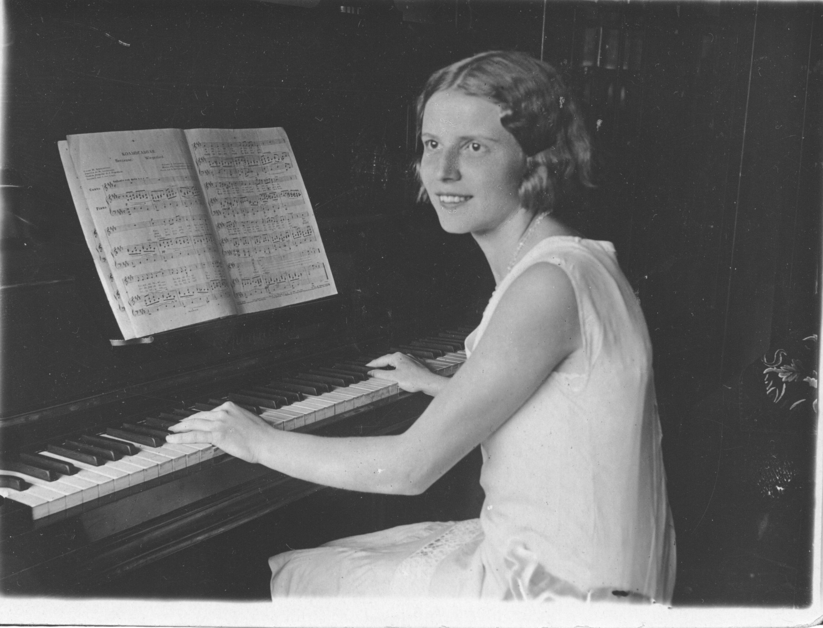 Чуренкова Варвара Кузьминична окончила институт благородных девиц в Николо – Угрешском монастыре (сокурсница княжны Евдокии Урусовой), и курс вокала в музыкальном техникуме Ипполитова-Иванова. Двоюродная племянница Замкова А.А. (мужа скульптора В.И. Мухиной)